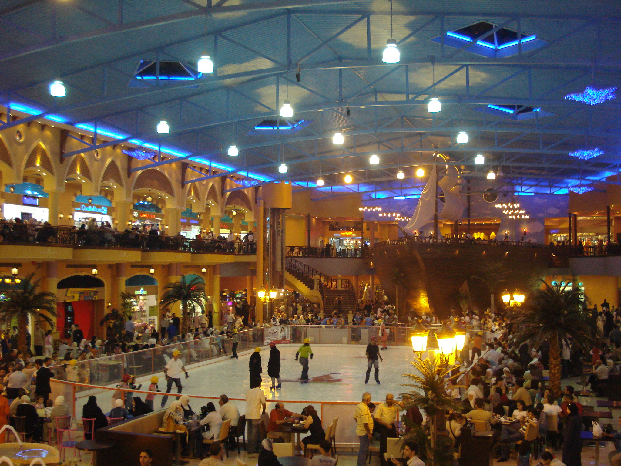 مجمع سكي لاند التجاري الذي يحتوي على أول صالة مغلقة للتزلج على الجليد في سوريا,قرب طريق المطار جنوب دمشق